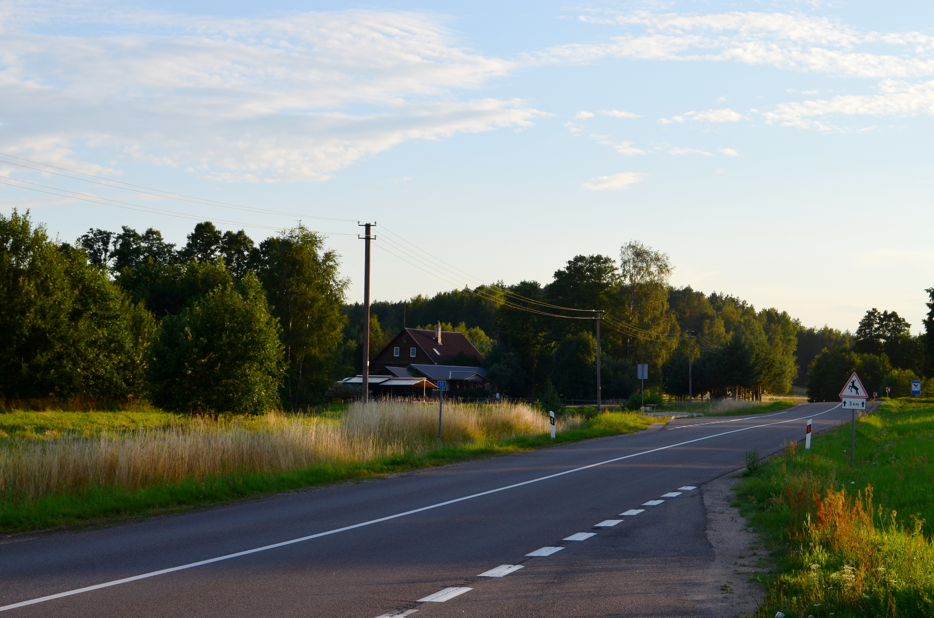 Juočių k., Mindūnų sen., Molėtų raj.